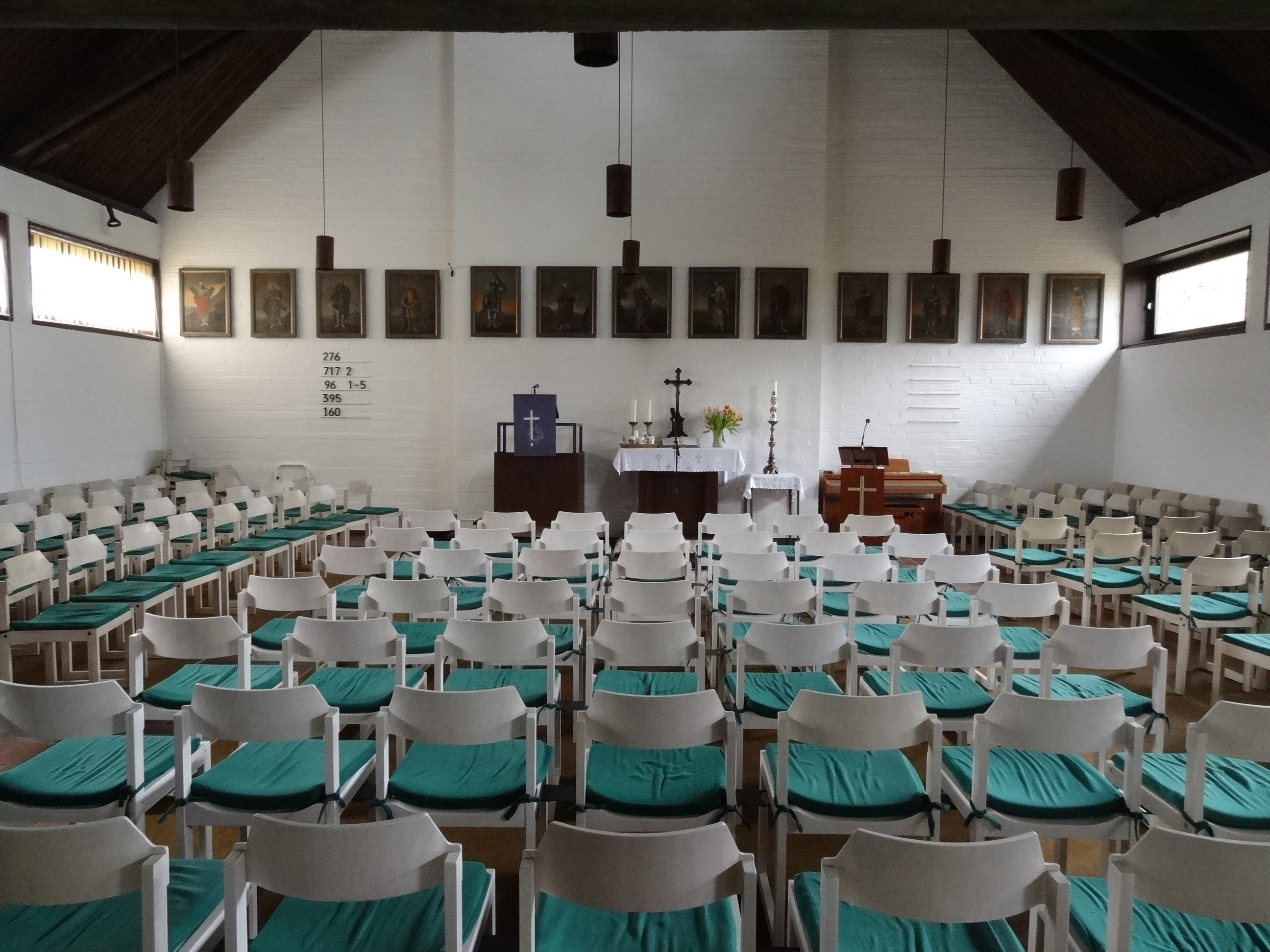 Evangelische Kirche (Hörnsheim)